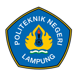 Logo Politeknik Negeri Lampung